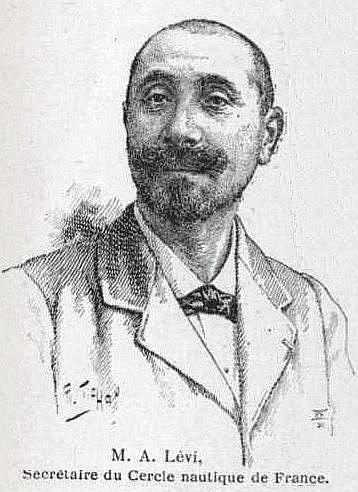 A. Lévi, Secrétaire du Cercle nautique de France, en 1895. page 52.